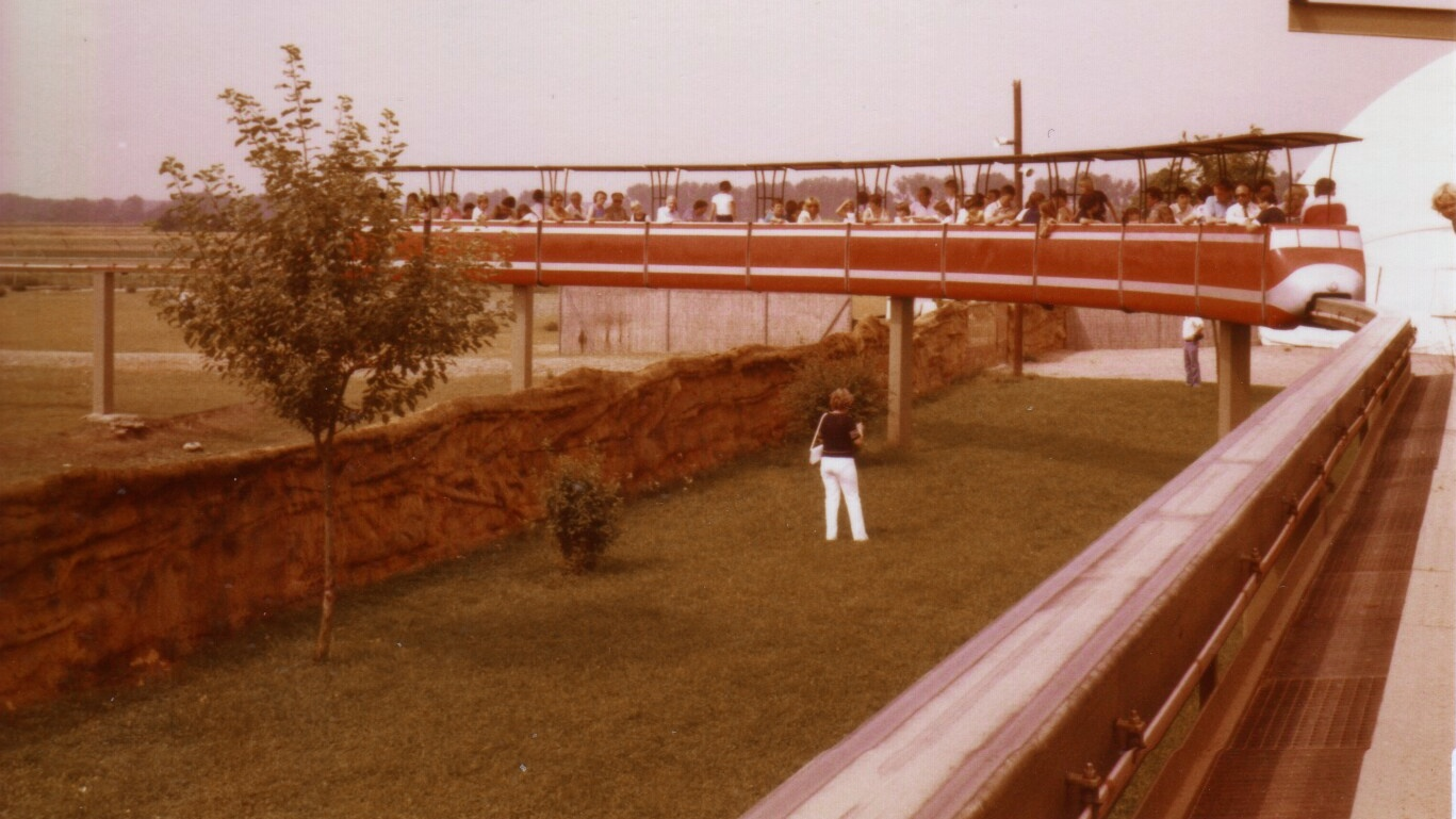 Hochbahn im Safariland Groß-Gerau